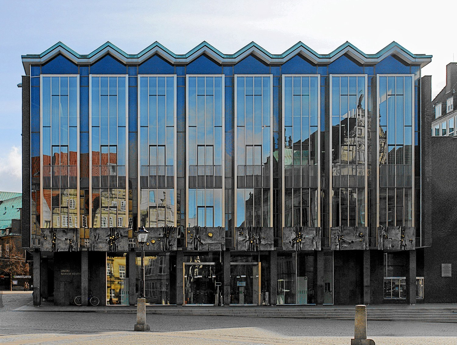 Haus der Bürgerschaft am Bremer Marktplatz. Erbaut 1965/66 nach Plänen des Architekten Wassili Luckhardt Das abgebildete Objekt ist ein geschütztes Kulturdenkmal in der Freien Hansestadt Bremen, mit der Nr. 0074 beim Landesamt für Denkmalpflege registriert.